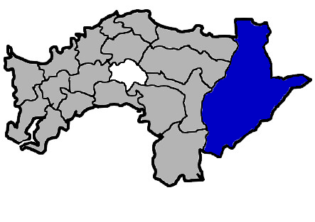 KaurJmeb為編輯中華民國臺灣省嘉義縣阿里山鄉，於2005年2月10日所繪。